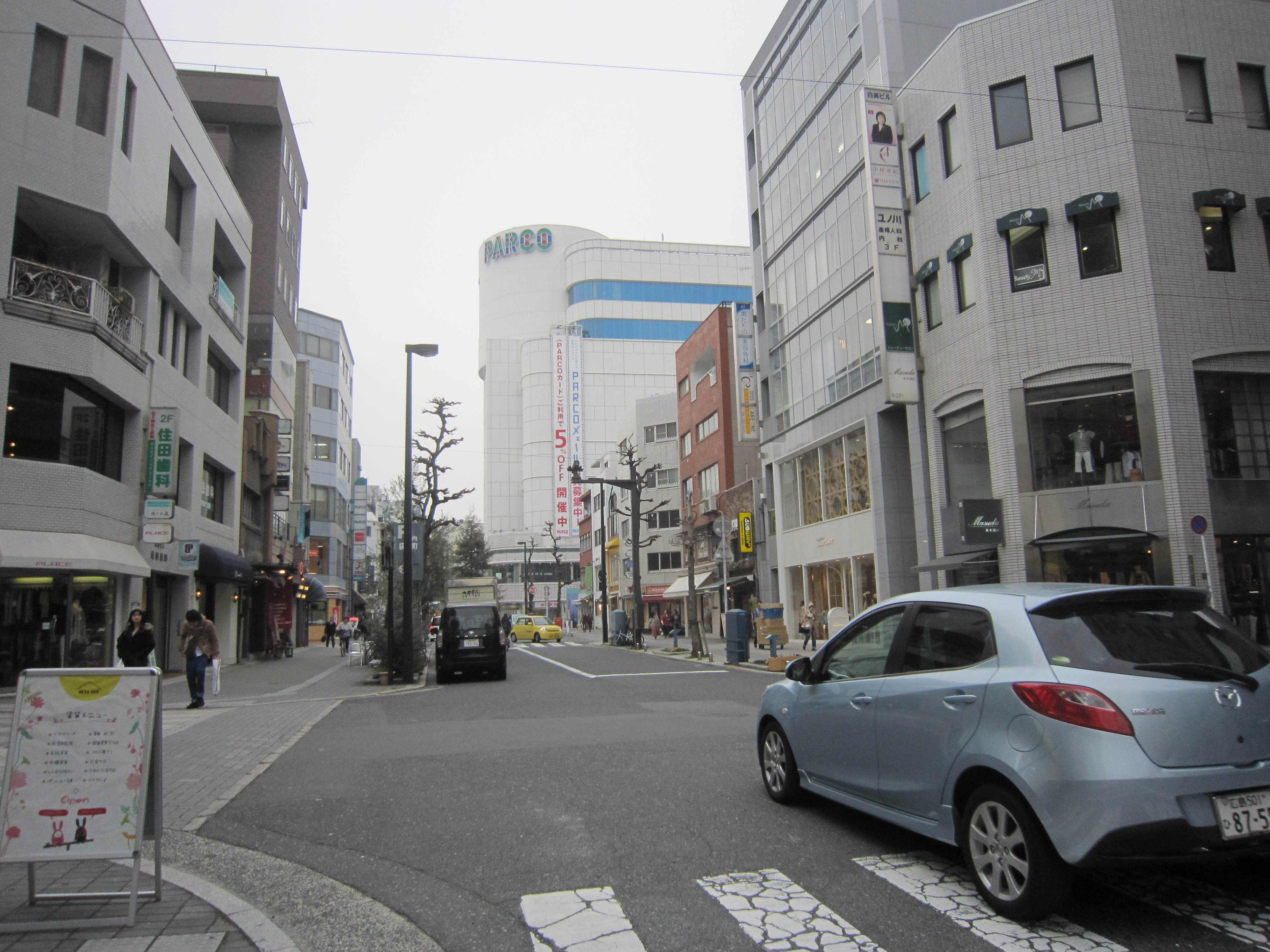 広島市中区にある並木通り。別名、新川場通り。旧平田屋川。